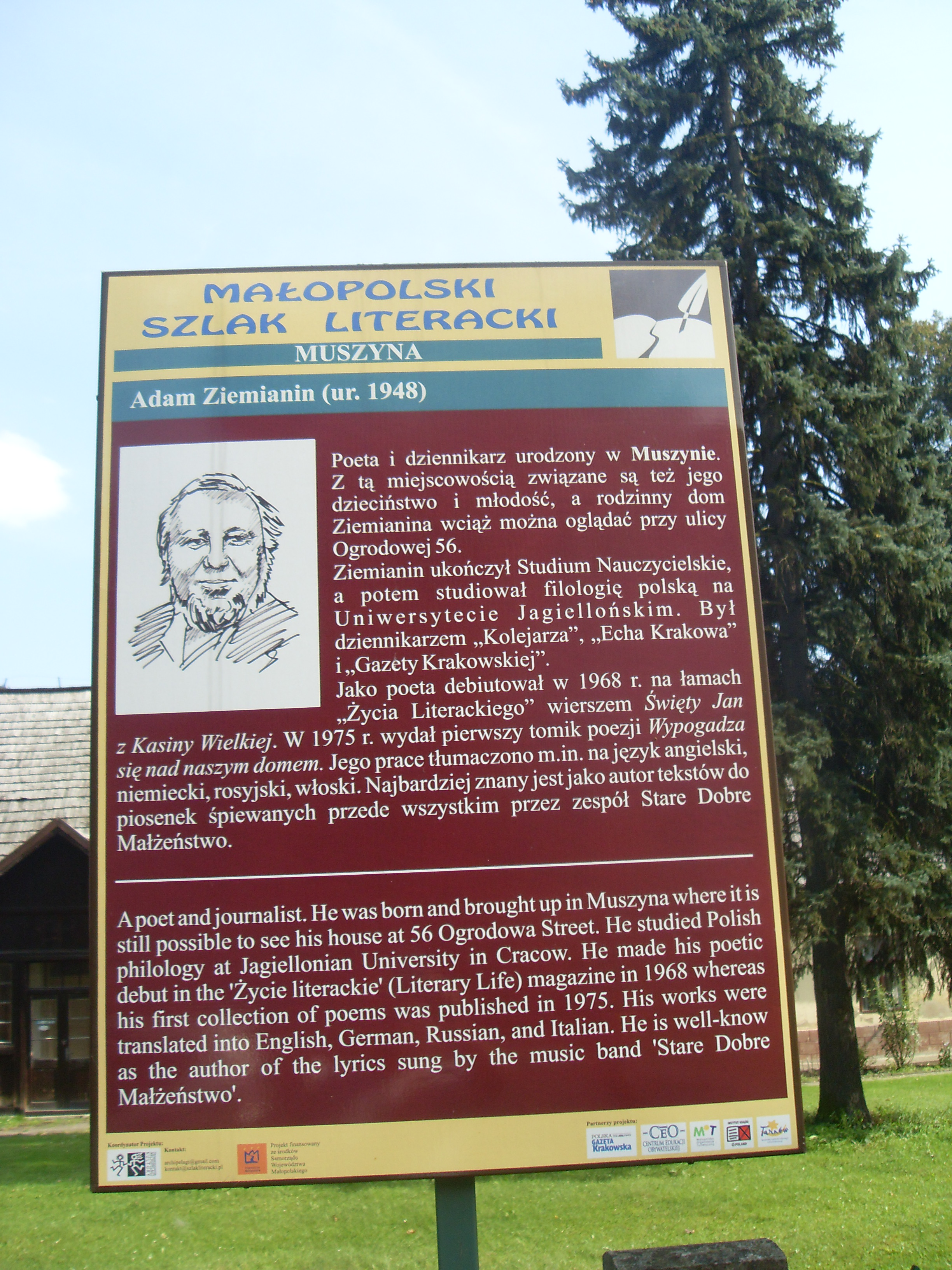 Tablica z informacjami o Adamie Ziemianinie, Muszyna